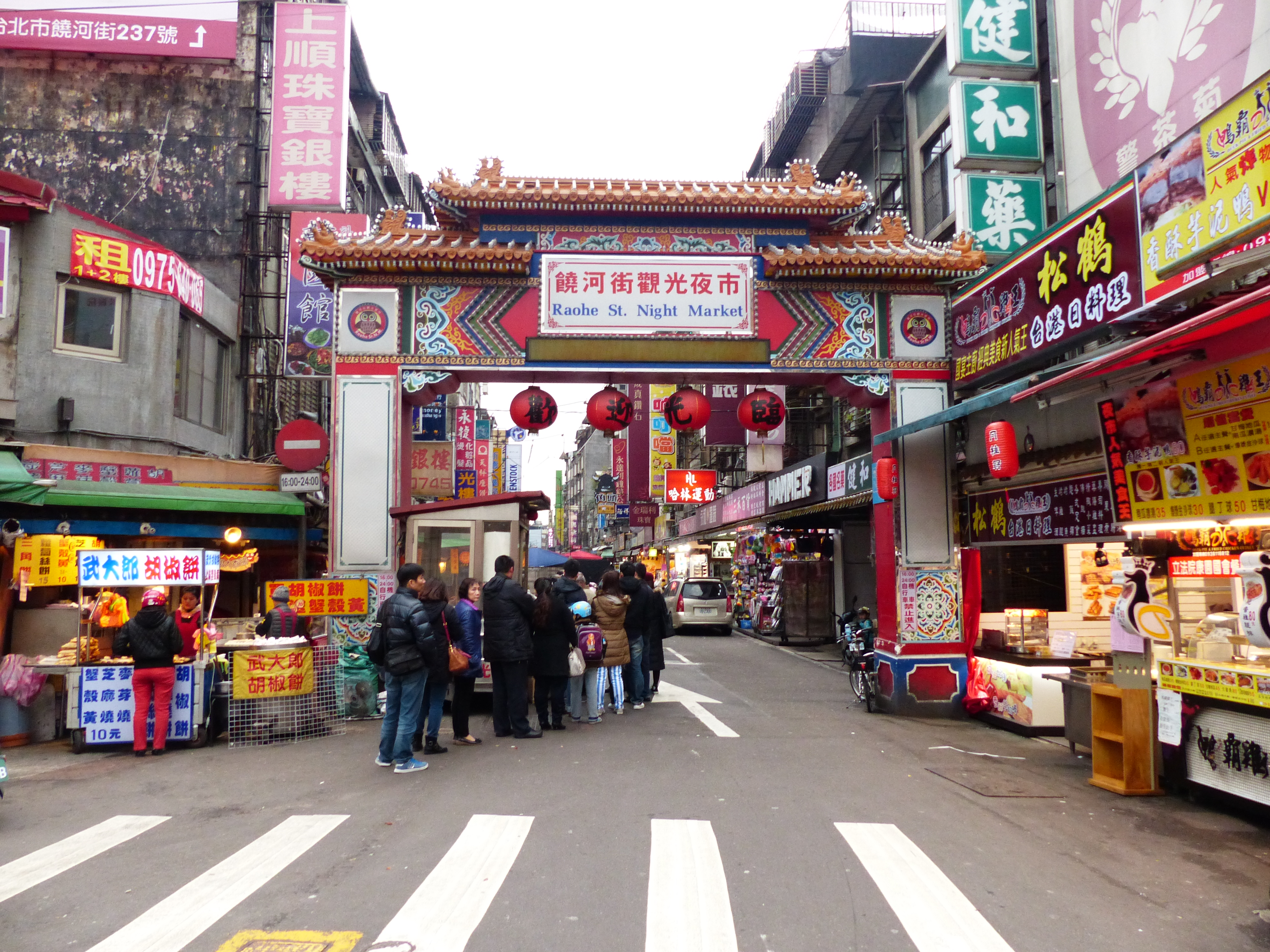 下午的饒河街觀光夜市東口。